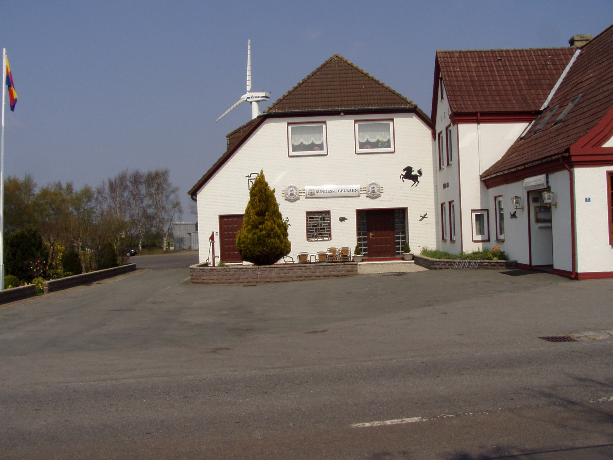 Immenstedt-Bahnhof. Bahnhofswirtschaft und Bahnhof, jetzt Gaststätte und Hotel. Links hinter der Blumenbeetbegrenzung verliefen die Gleise.